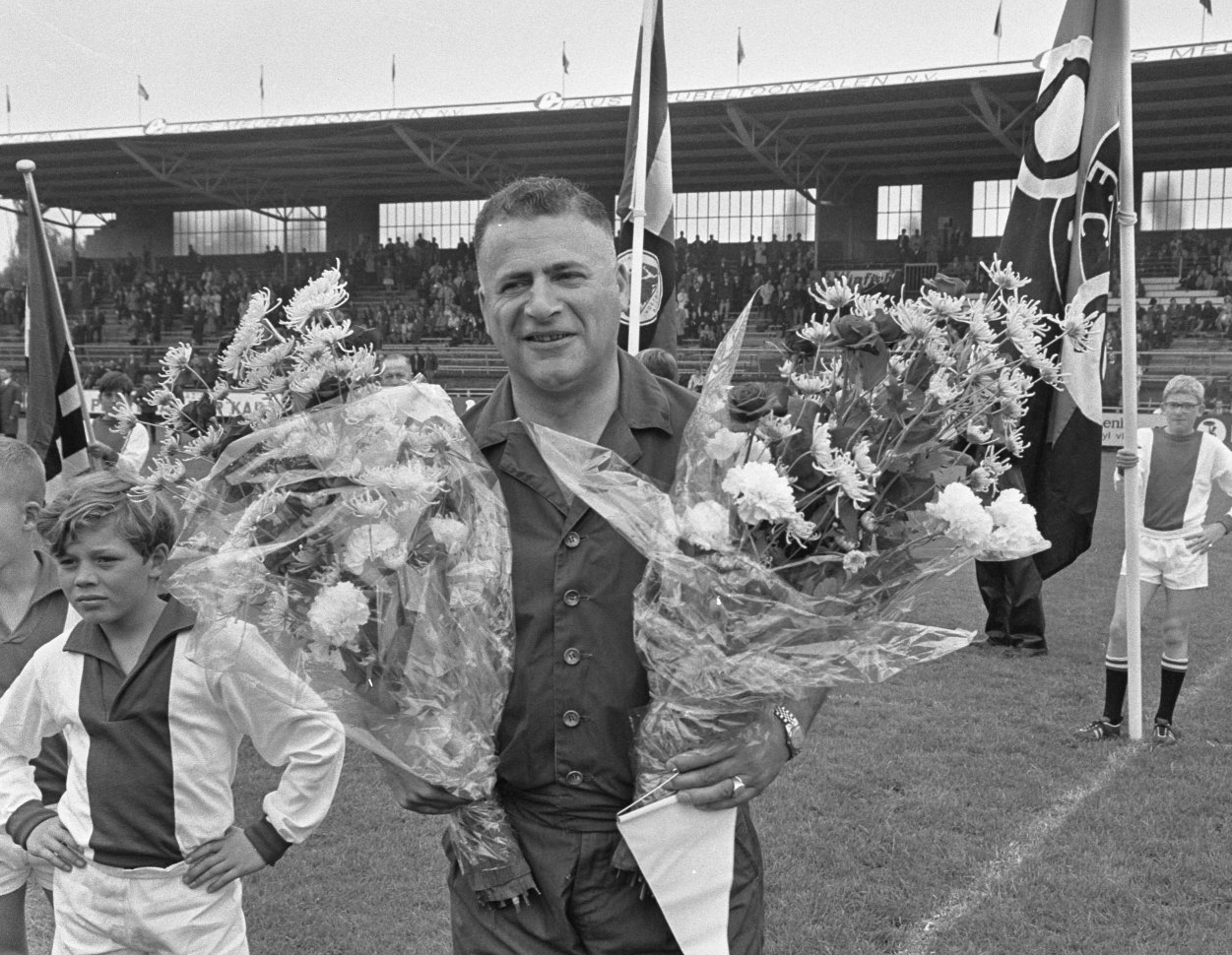 Ajax tegen Bulgaars selectieteam ZSCA 7-1, Leo Horn met bloemen floot laatste wedstrijden.